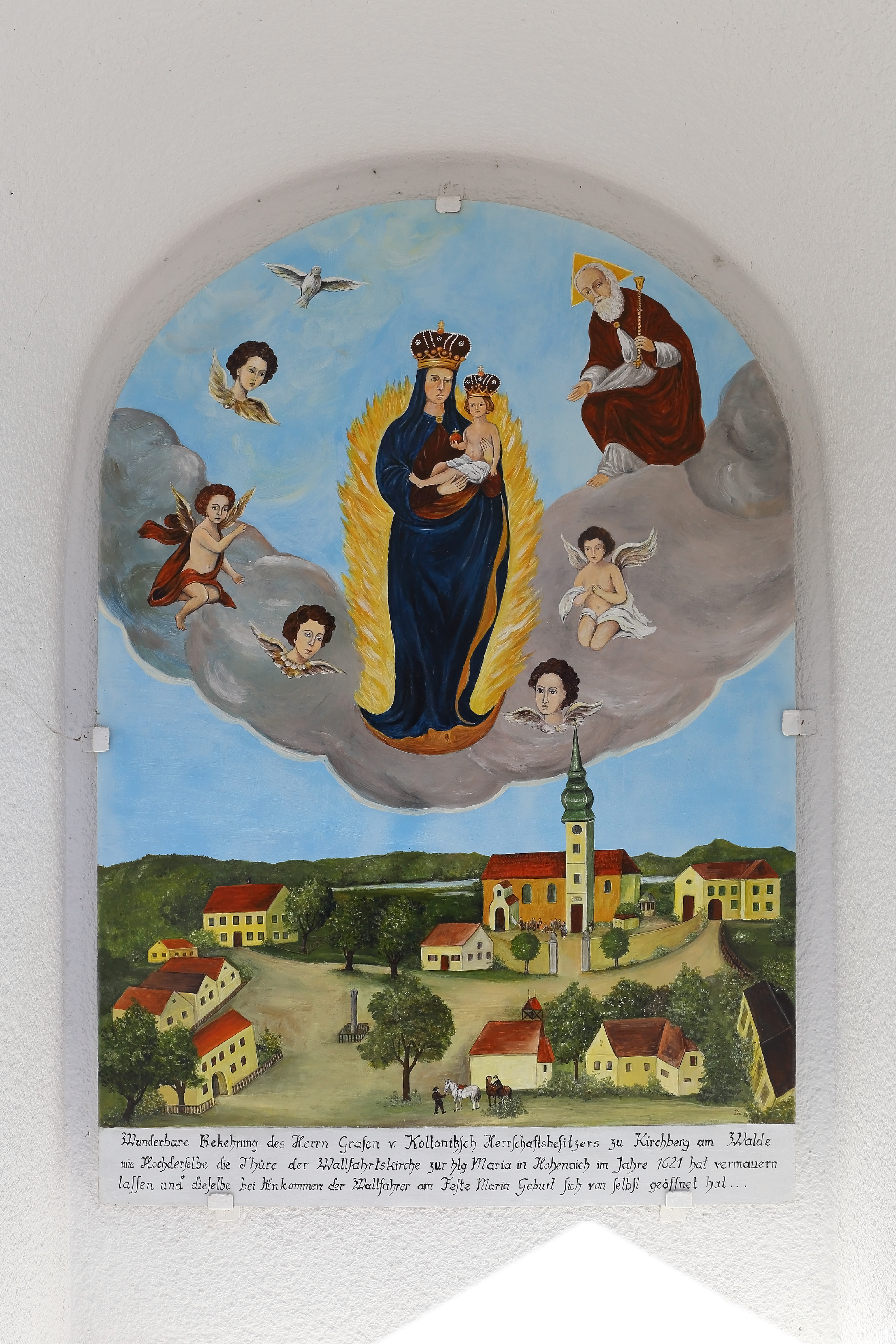 Rammelmarterl beim Vereinssaal in Hoheneich - Das Bild zeigt die wundersame Bekehrung des Grafen von Kollonitsch im Jahr 1621.